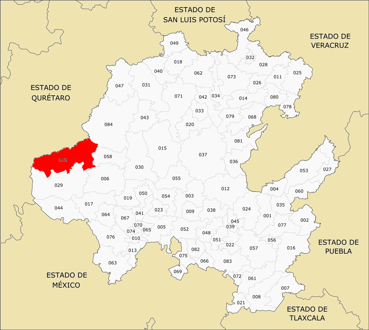 Municipio de Hidalgo